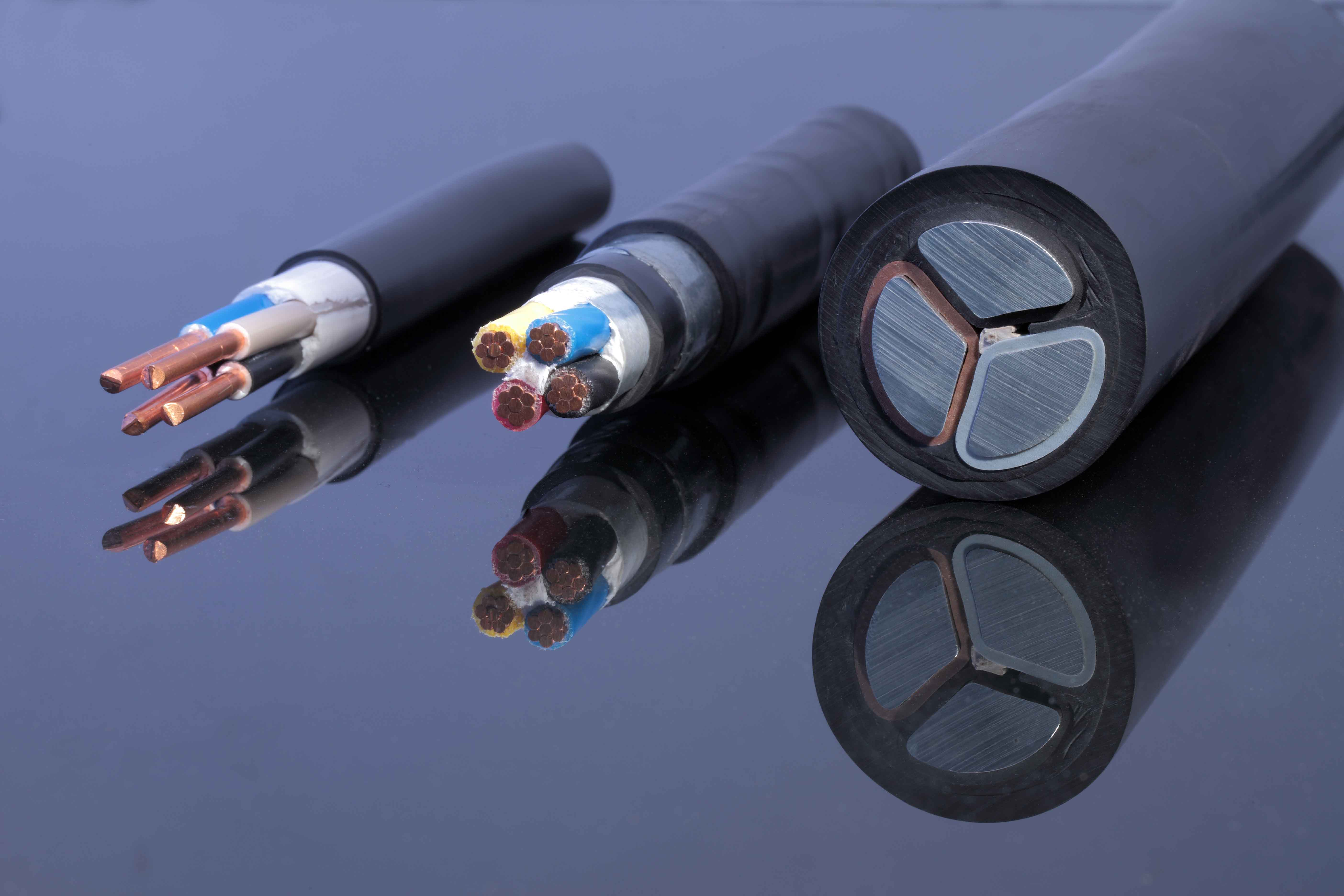 Cable Compounds